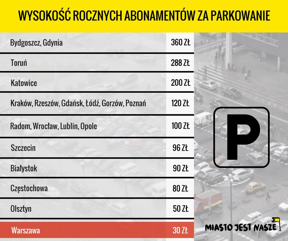 Wysokość rocznych abonamentów w strefie płatnego parkowania na wybranych miastach w Polsce.